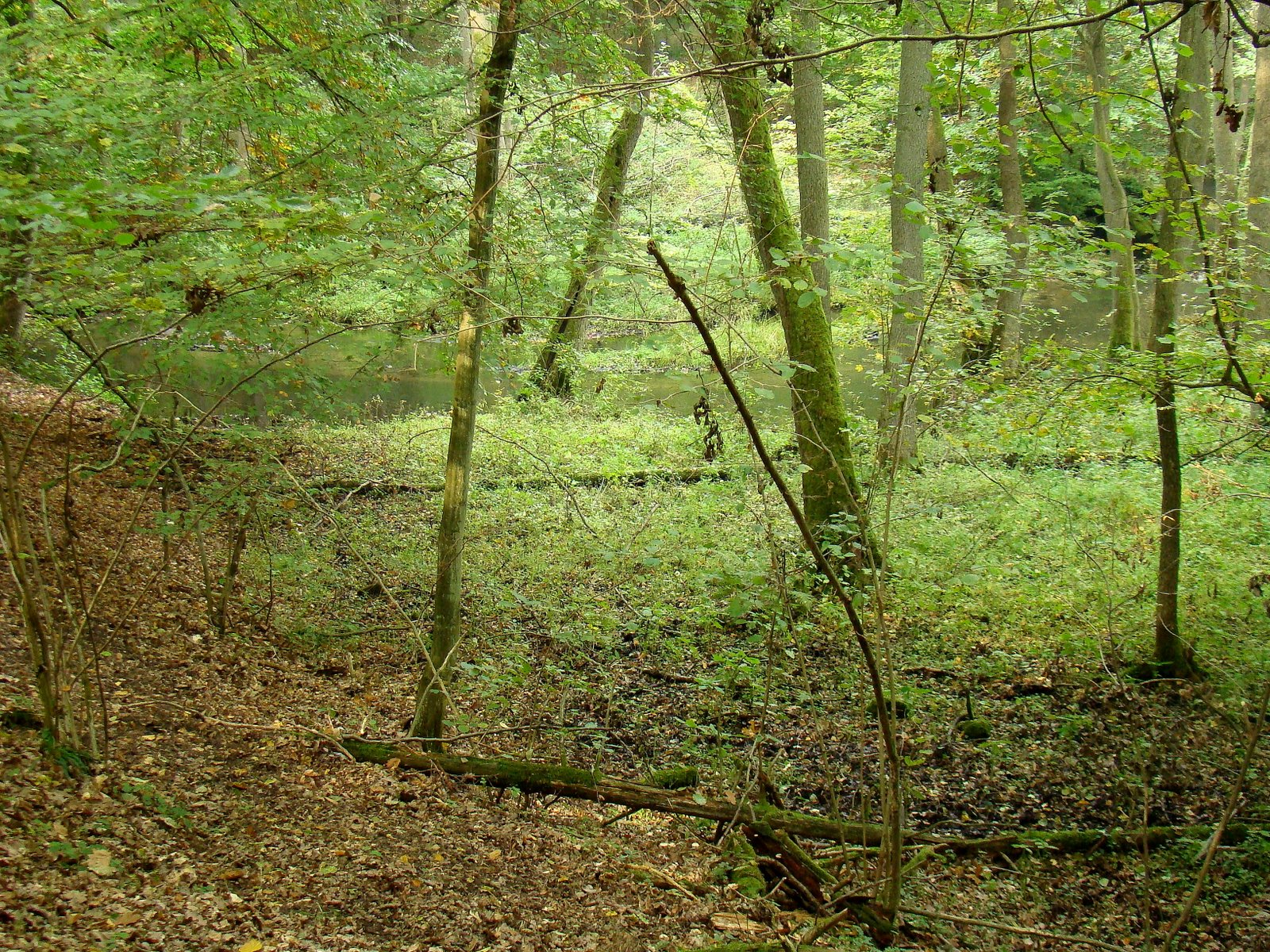 Krzemieńskie Żródliska